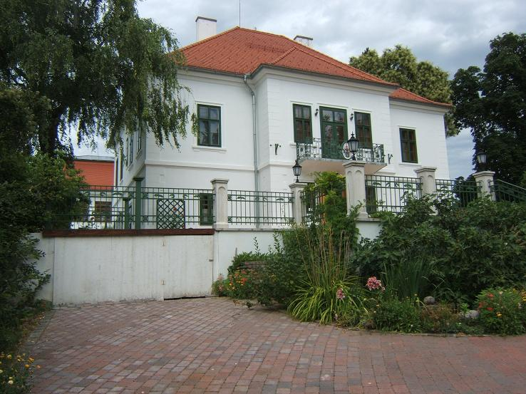 Felsőmocsolád kastélya